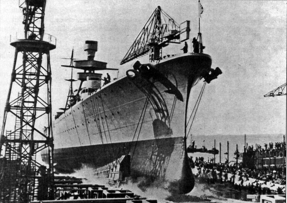 Cantiere della Foce, 28 settembre 1929. Il varo dell'incrociatore Almirante Brown, l'ultima unità costruita dal cantiere genovese i cui scali, poco tempo dopo, verranno smantellati per consentire l'espansione urbanistica della città nella zona della foce del torrente Bisagno